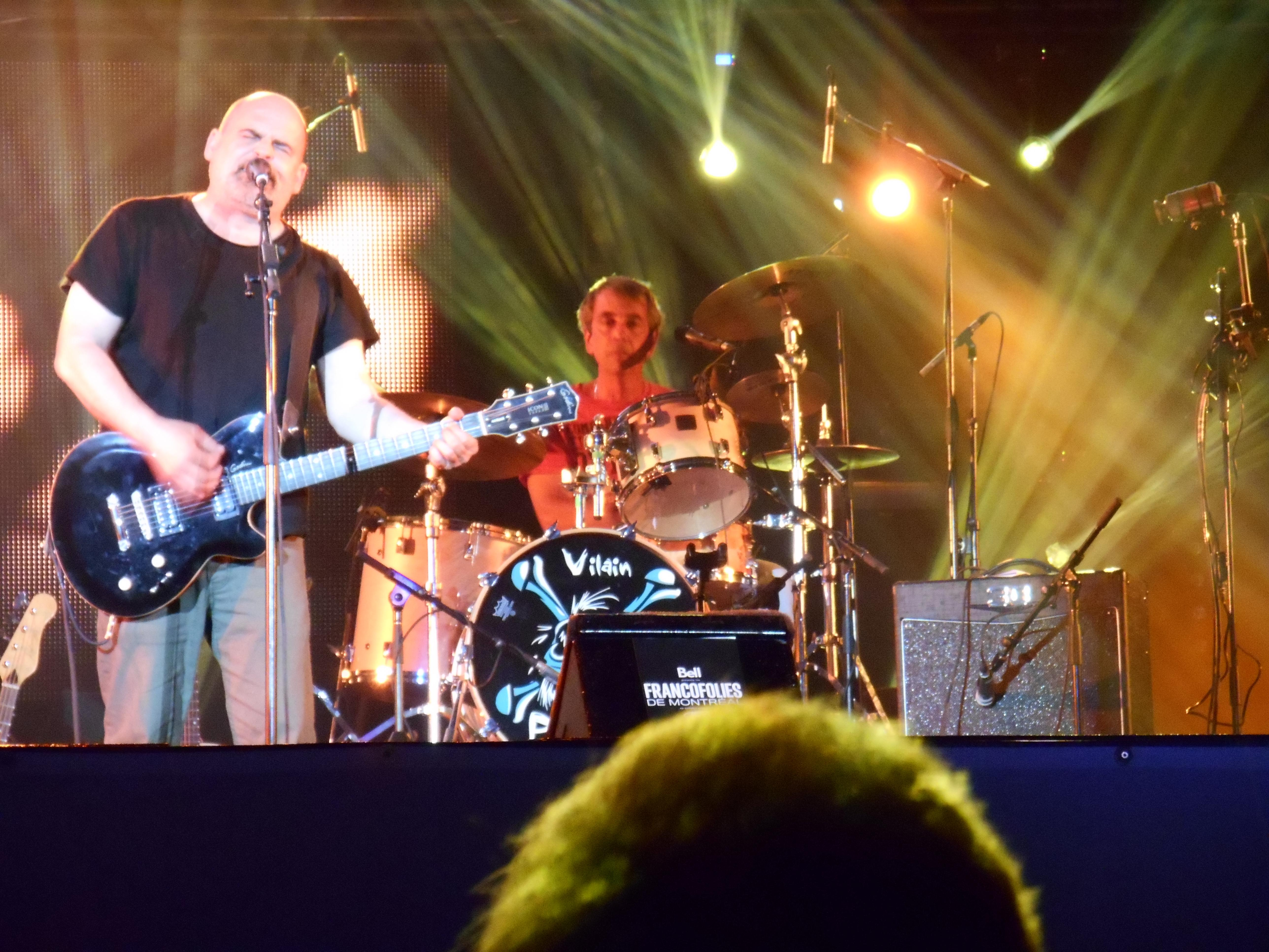 Le groupe Vilain Pingouin a offert une performance aux FrancoFolies de Montréal, le 13 juin 2014, à la place des Festivals.